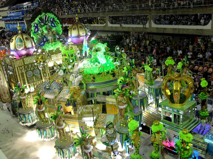 Imperatriz Leopoldinense 2011 - Sábado das Campeãs - Fotos Descompromissadas. Mostrando apenas um pouco desse maravilhoso carnaval do Rio de Janeiro. CARNAVAL CARIOCA - A Oitava Maravilha do Mundo !!!